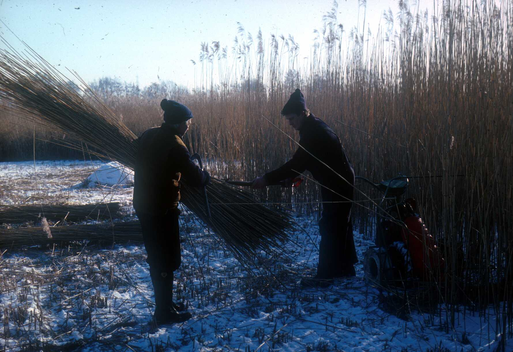 Schilfmahd im Gebiet "Die Reit" im Winter